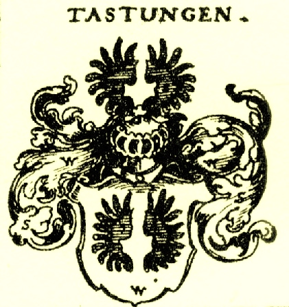 Wappen derer von Tastungen Siebmacher Blatt C130